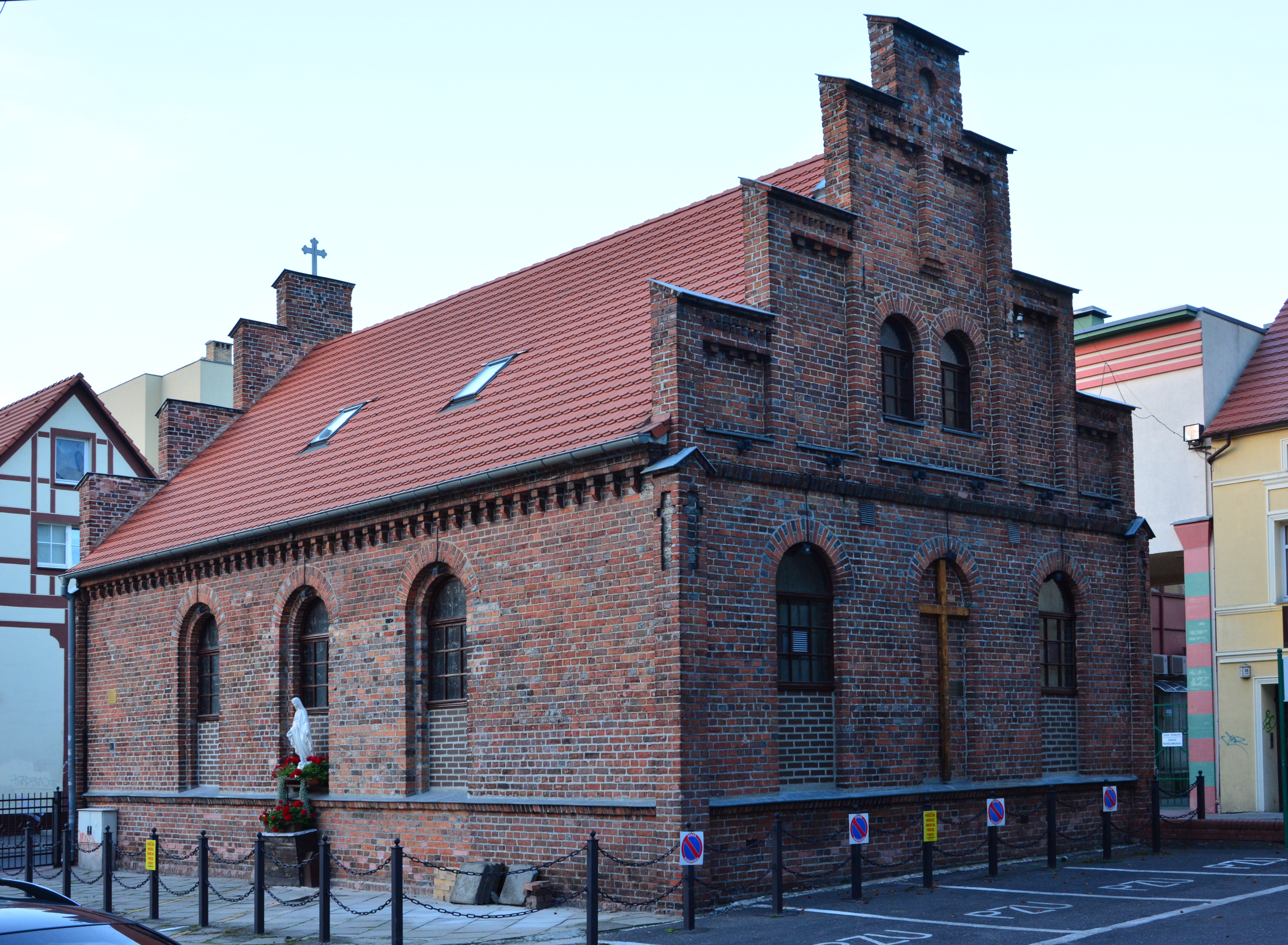 Zielona Góra, kaplica staroluterańska, ob. kościół polsko-kat. p.w. Matki Boskiej Królowej, 1860-1866